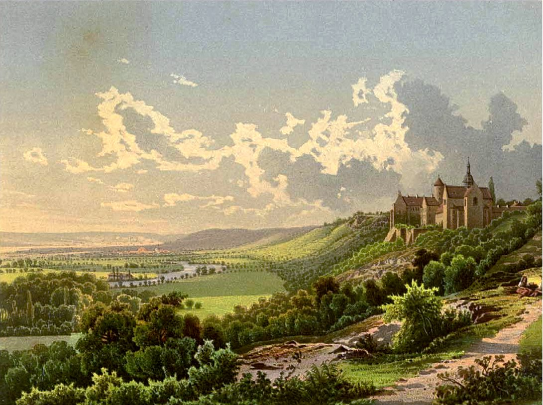 Schloss Goseck, Lithografie aus dem 19. Jahrhundert